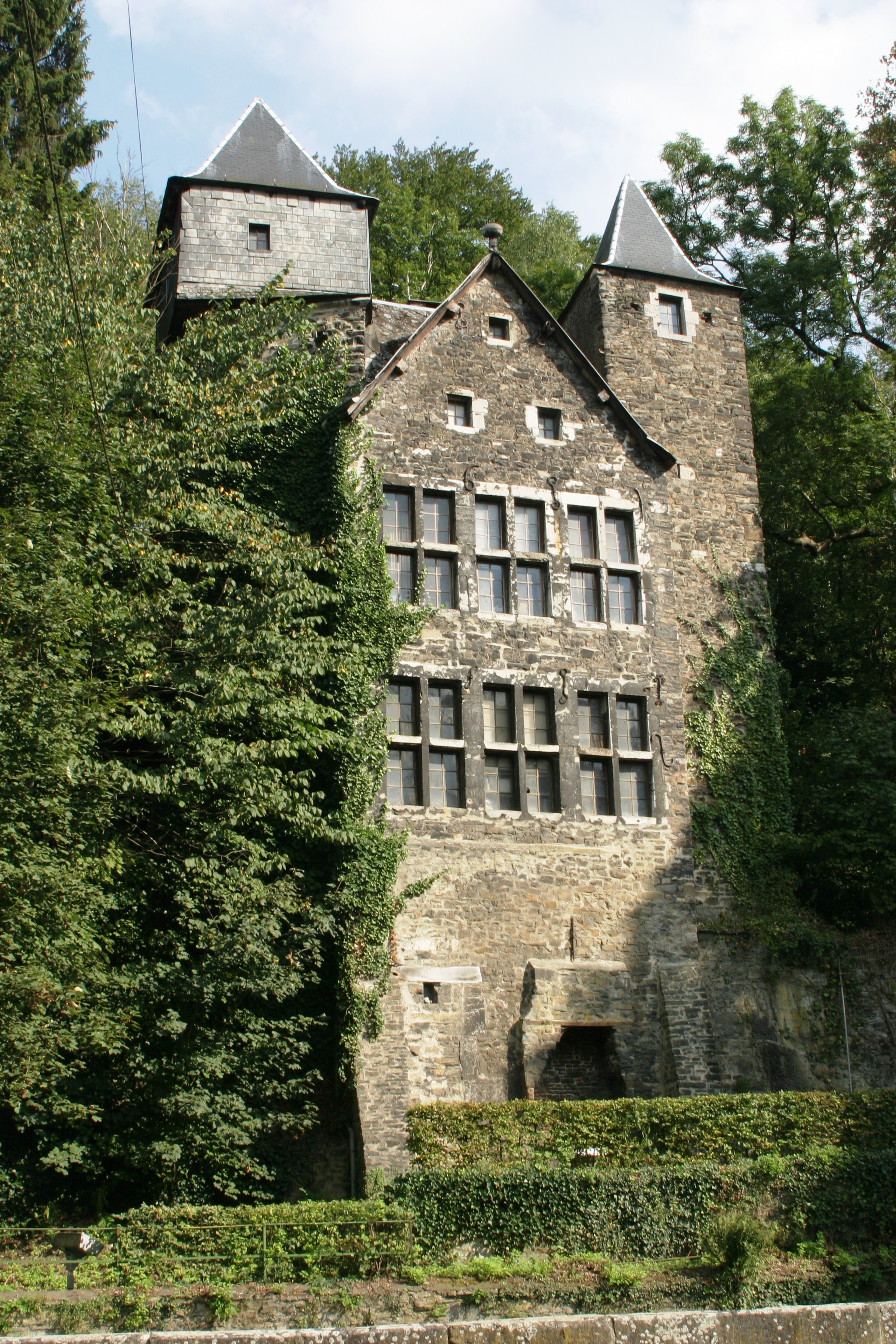 La Fenderie, d'Schlass 2006.